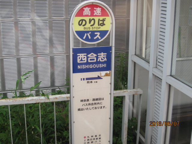 西合志バスストップ